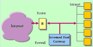 Primer zaštitnog zida poznatijeg kao zaklonjeni prolaz.